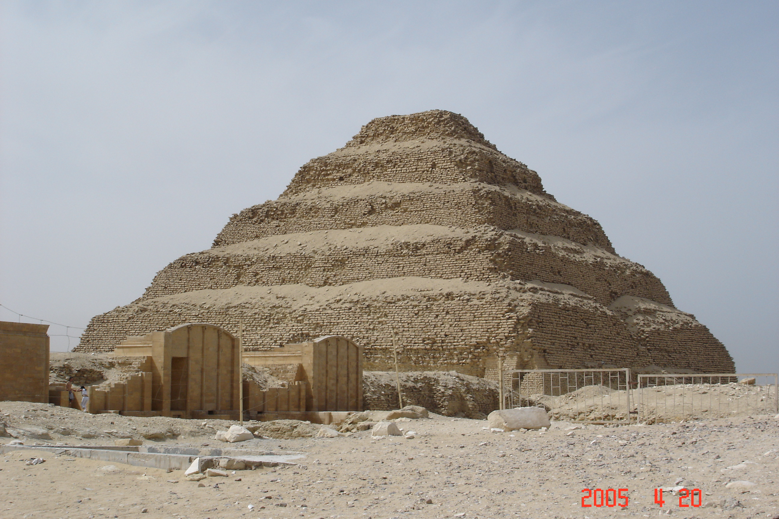 Dzsószer fáraó 58 méter magas lépcsős piramisa (Szakkara, Egyiptom)